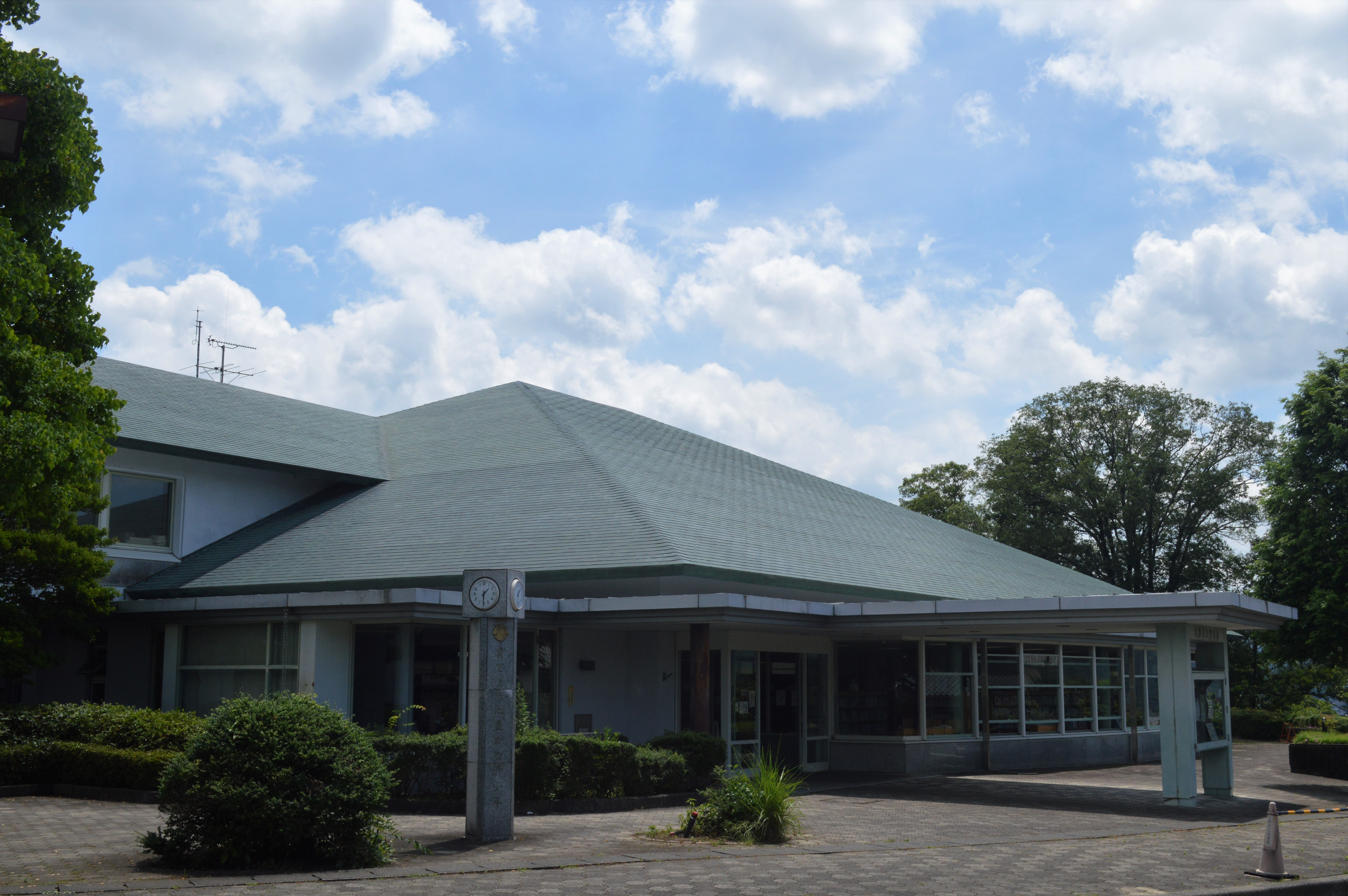 三重県名張市の名張市立図書館。